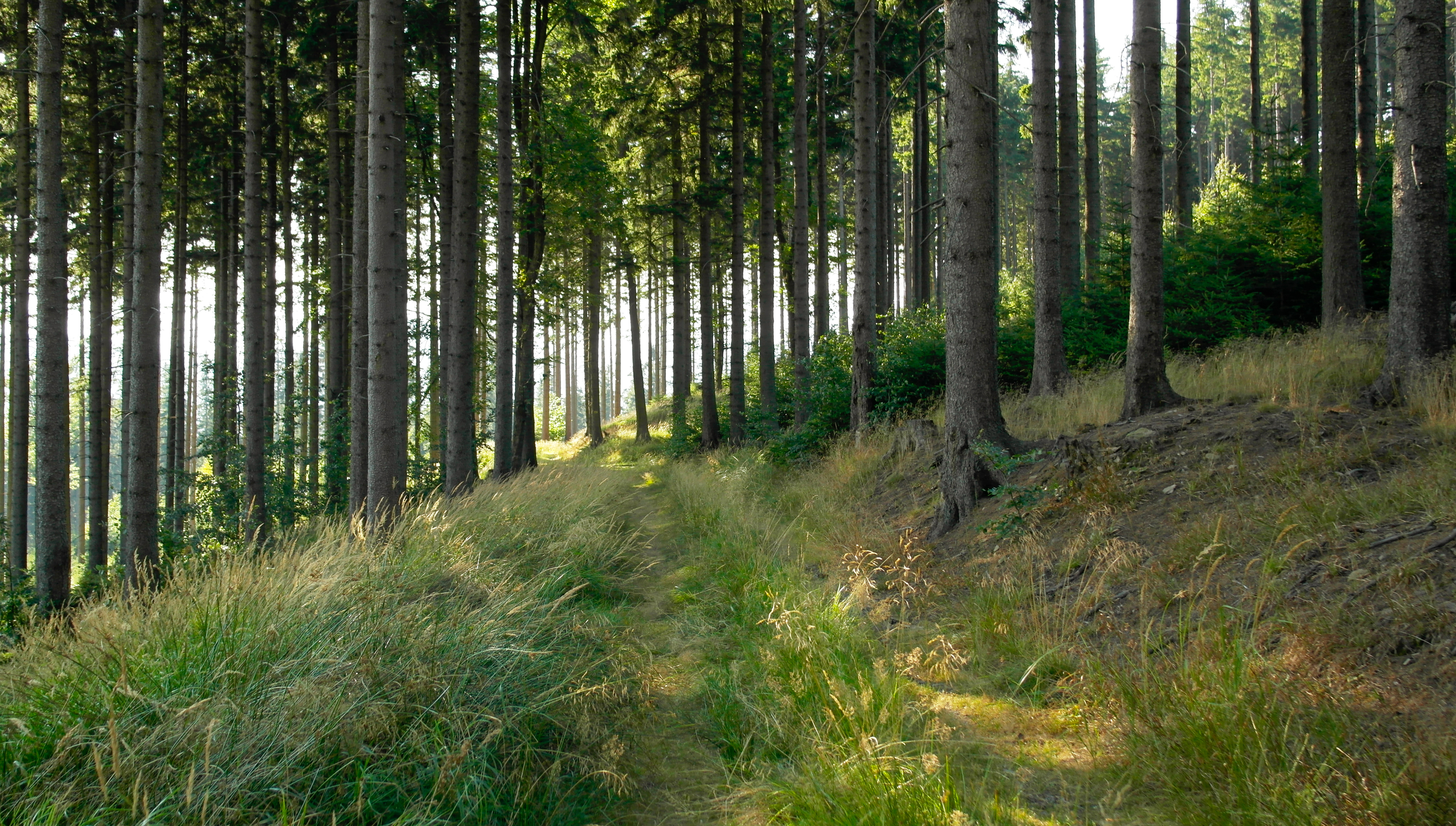 Droga wiodąca na szczyt.